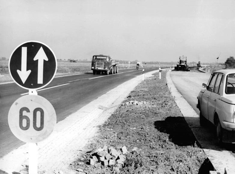 Erfurt, Neubau F 4 ADN-ZB Ludwig-9.10.71 Erfurt: Neubau Fernverkehrsstraße 4. Die vom Harz zum Thüringer Wald führende und von Nord nach Süd den Bezirk Erfurt durchquerende Fernverkehrsstraße 4 wird gegenwärtig auf einem ihrer verkehrs- und unfallreichsten Abschnitte vierspurig neugebaut. Es ist das größte Straßenbauvorhaben des Bezirkes seit 1945. Schwerpunkt wird das Kreuzungsbauwerk bei Andisleben sein. Die neue Trasse wird teils autobahnähnlich ausgebaut und die bisher passierten Orte umgehen. Eine Seite der vierspurigen F4 bei Andisleben ist bereits für den Verkehr freigegeben. [Bei Erfurt.- Neubau F 4, Straßenbauarbeiten, Vorschriftzeichen "Zulässige Höchstgeschwindigkeit 60km/h"]